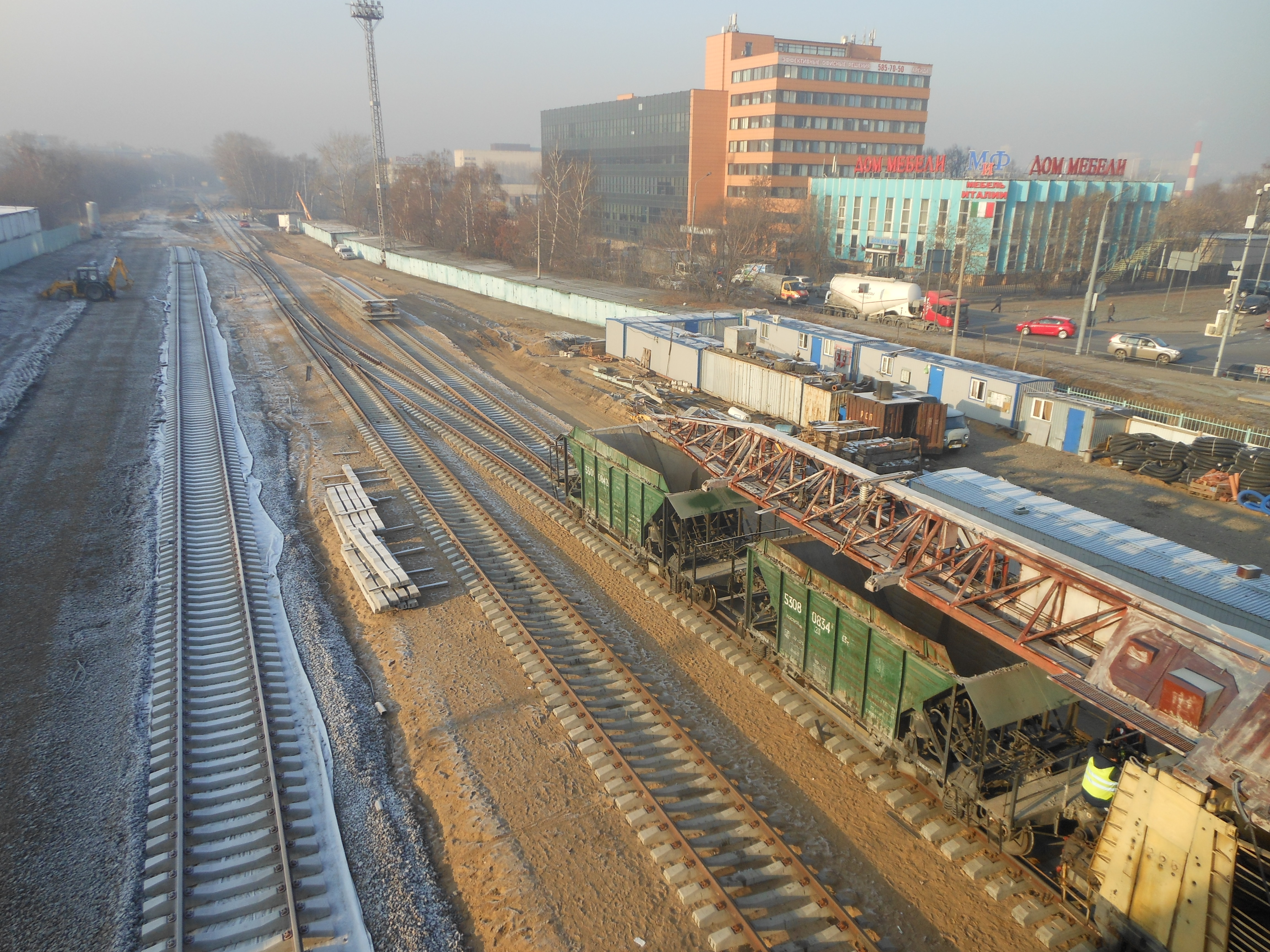 Реконструкция путей на станции Владыкино-Московское.